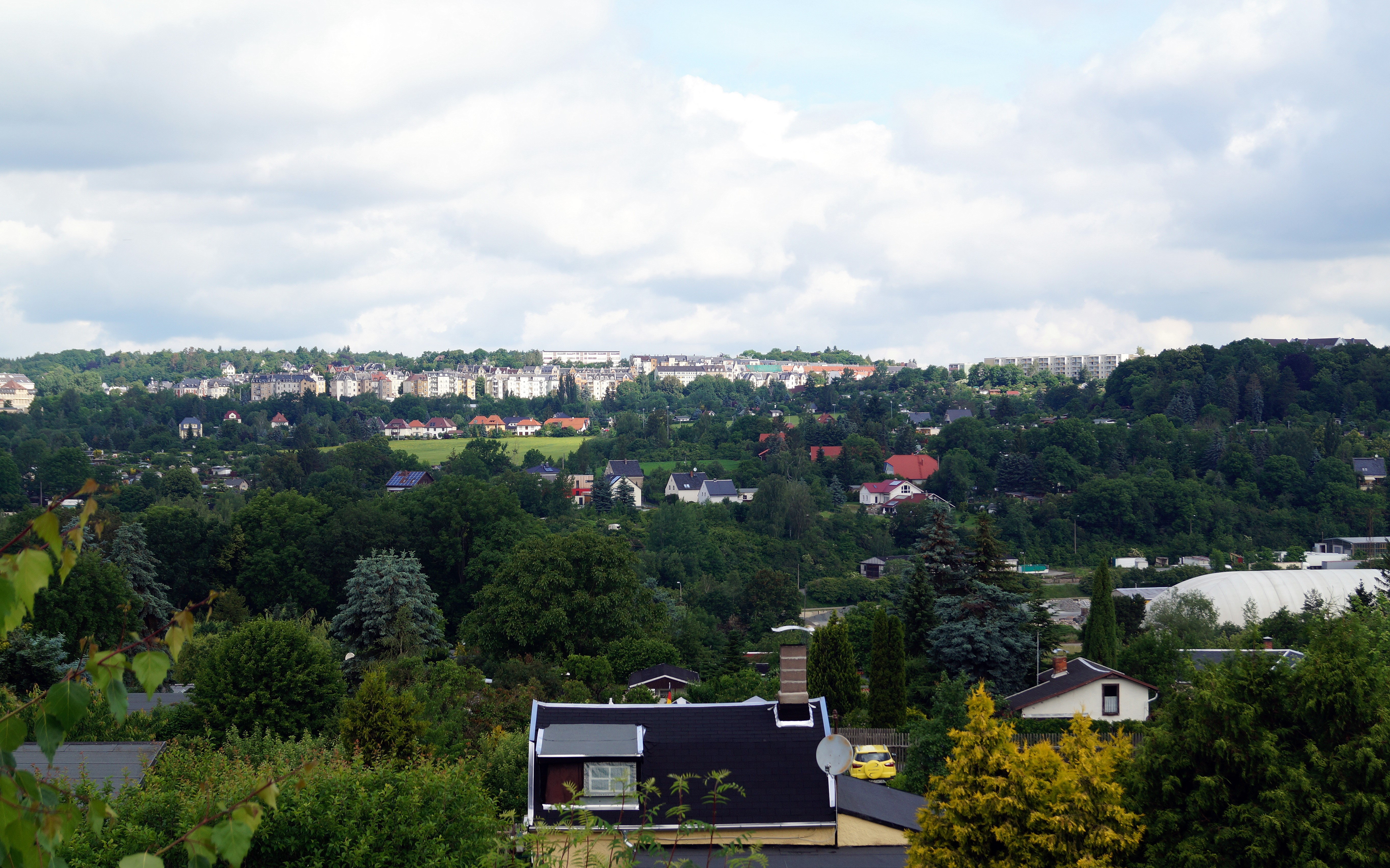 Blick nach Plauen-Neundorf aus Plauen-Thiergarten